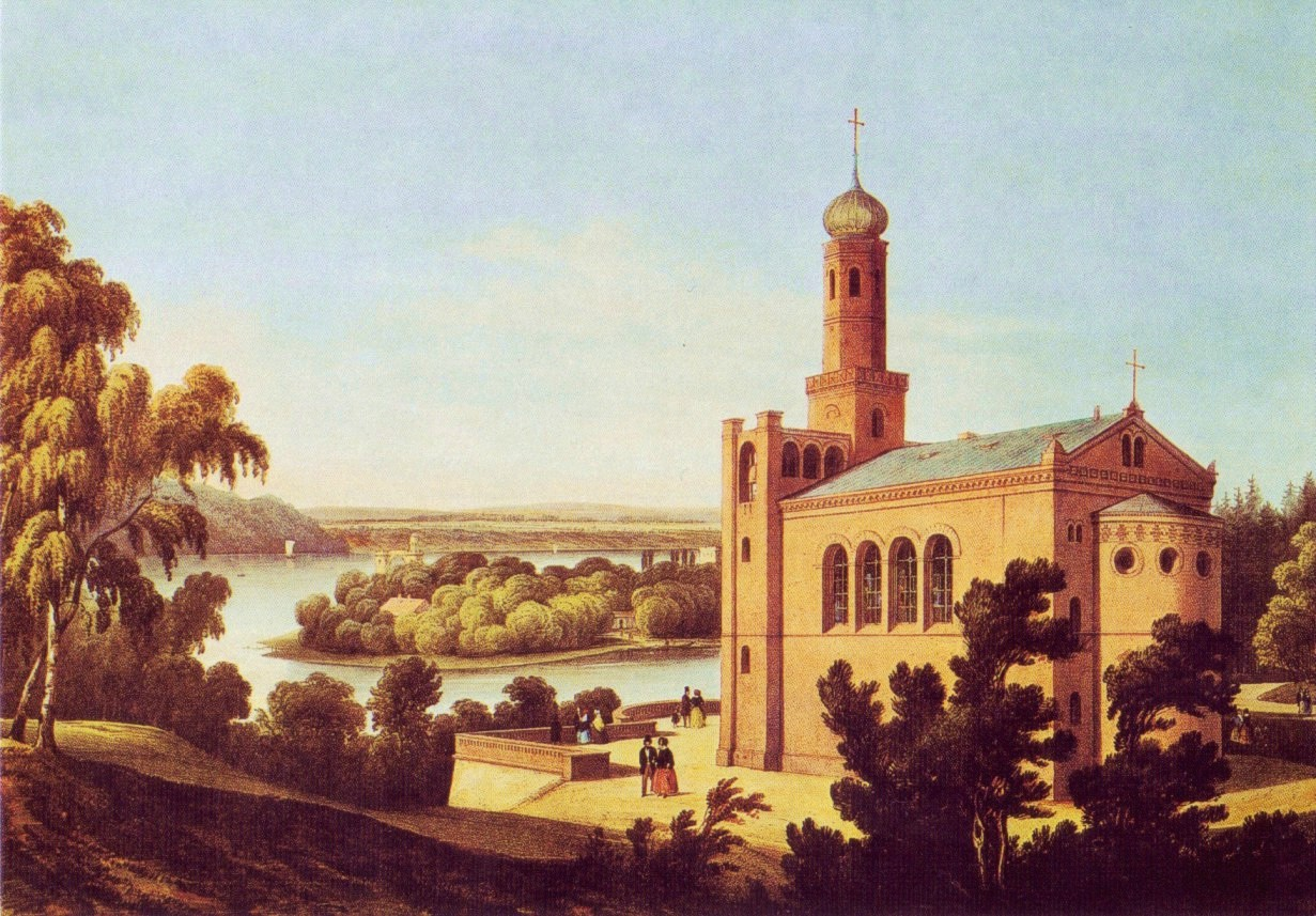 Kirche St. Peter und Paul in Berlin-Wannsee. Kolorierte Lithographie.